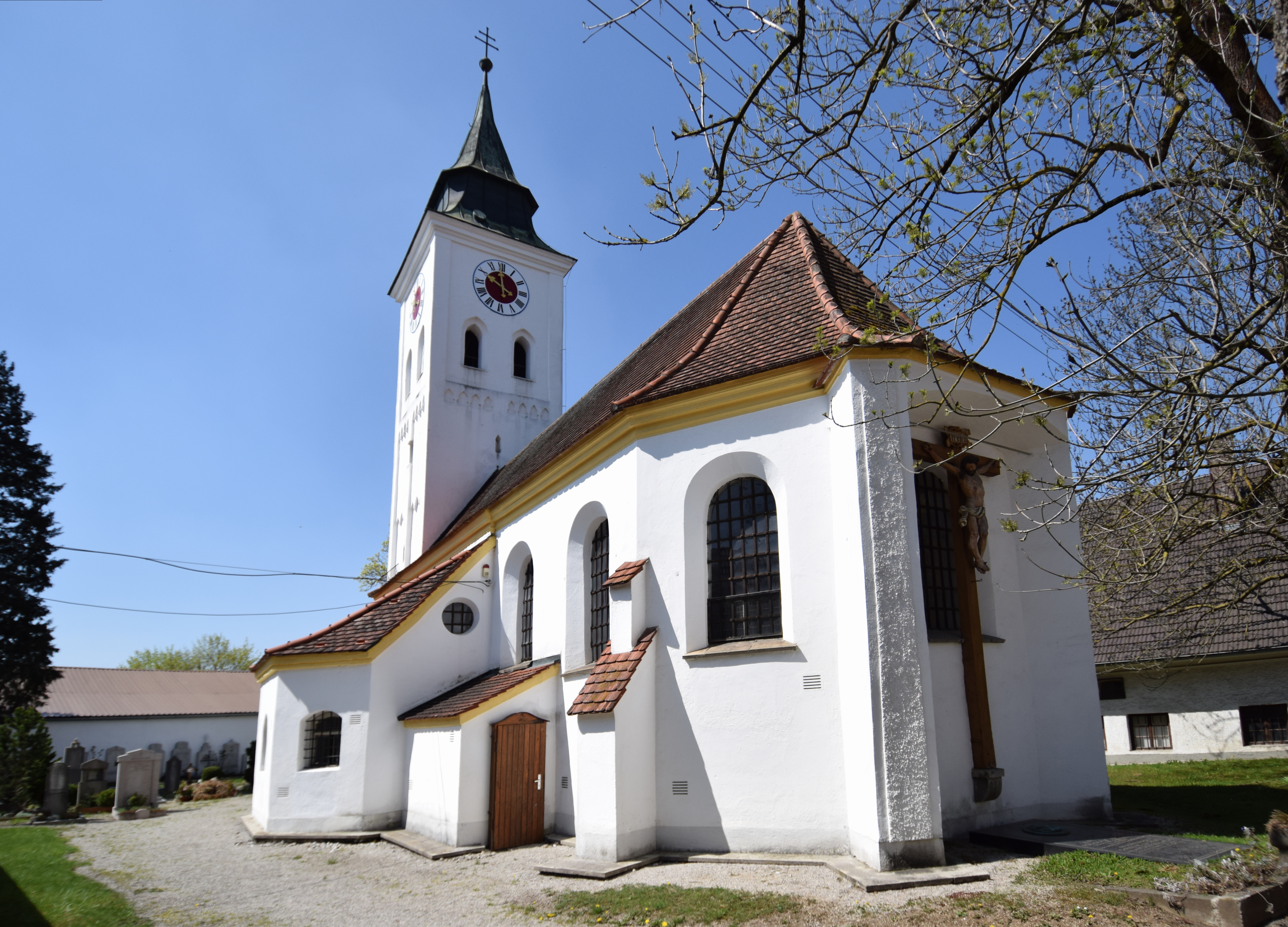 Heilig-Kreuz-Kirche in Gut Freiham, Ansicht von Osten